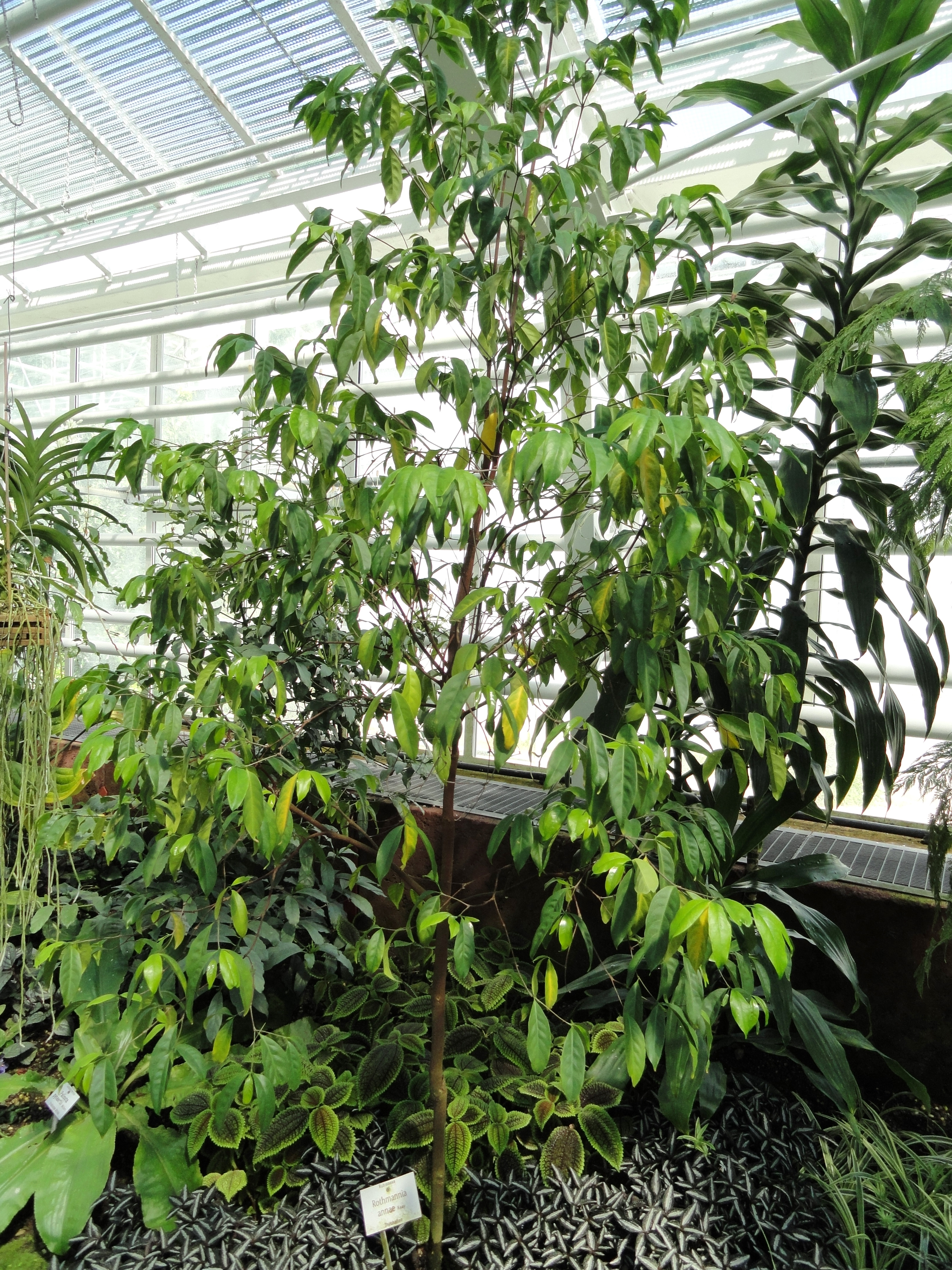 Rothmannia annae specimen in the Botanischer Garten München-Nymphenburg, Munich, Germany.